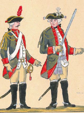 26. Regiment dragonów (Kozłowskiego) [Dragon i oficer regimentu dragonii im. królowej (późniejszy 1 pułk przedniej straży)]